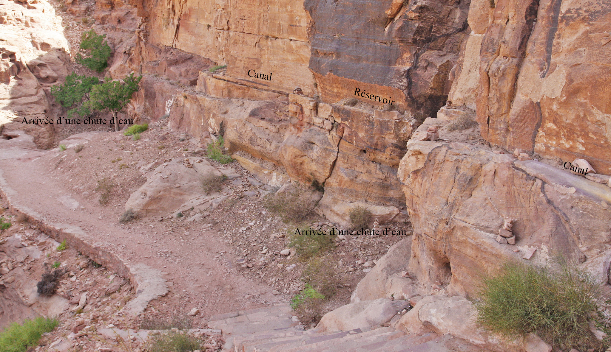 Canaux et réservoirs de décantation creusés dans la montagne autour de Pétra.